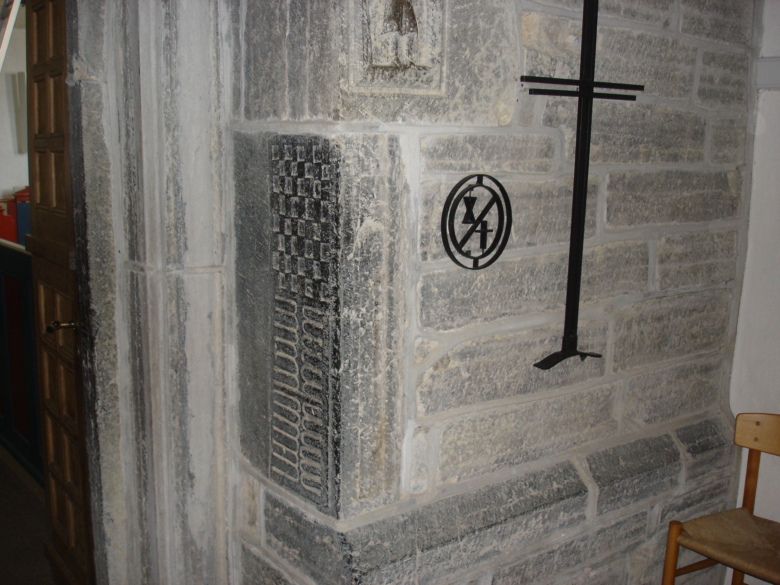 Sten med skak- og backgammonbræt i våbenhuset, Sankt Povls Kirke på Bornholm